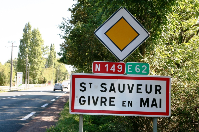 Français